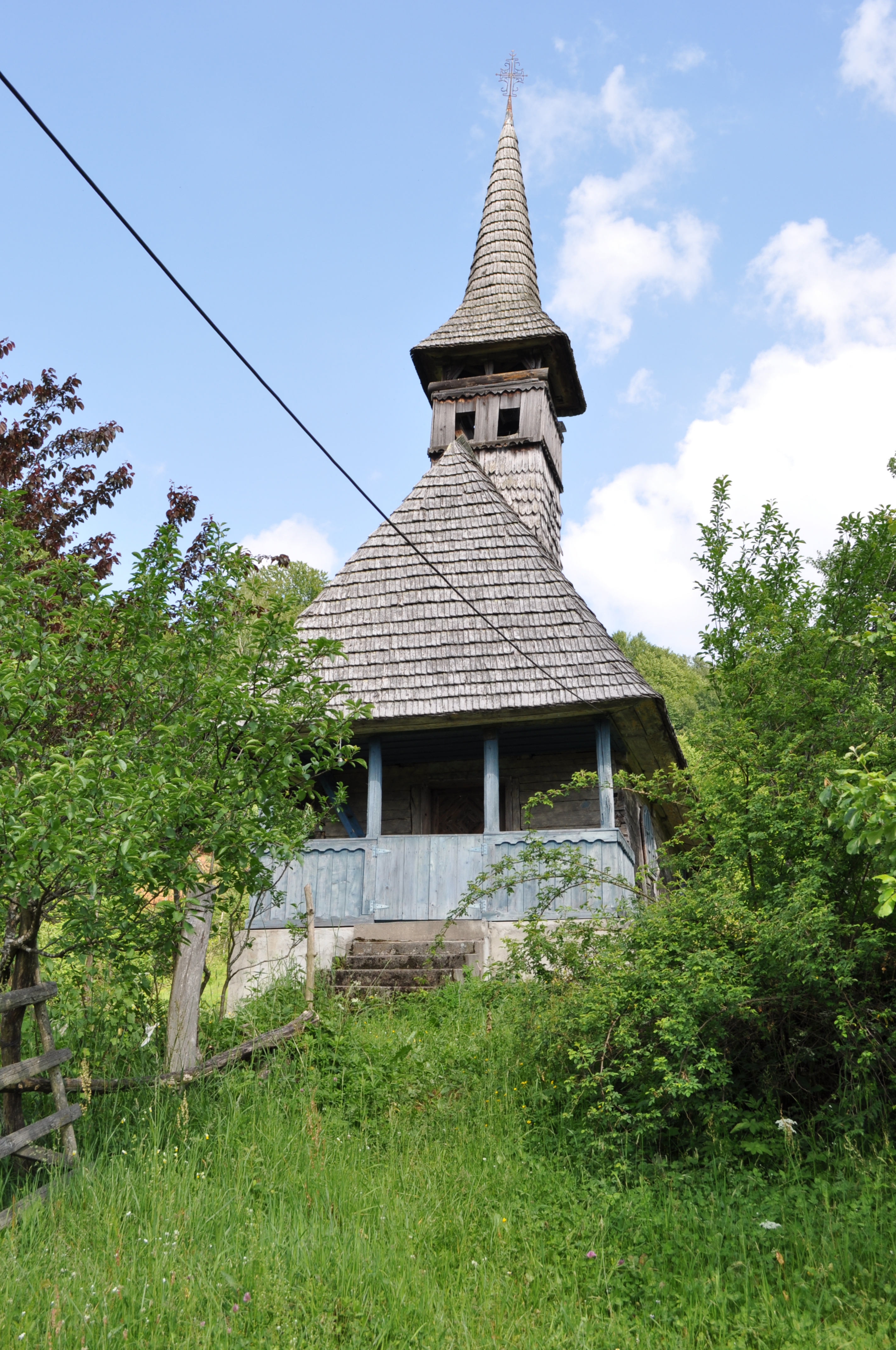 Biserica de lemn "Sf. Ioan Evanghelistul" , sat IZVOARELE; comuna CERNEŞTI